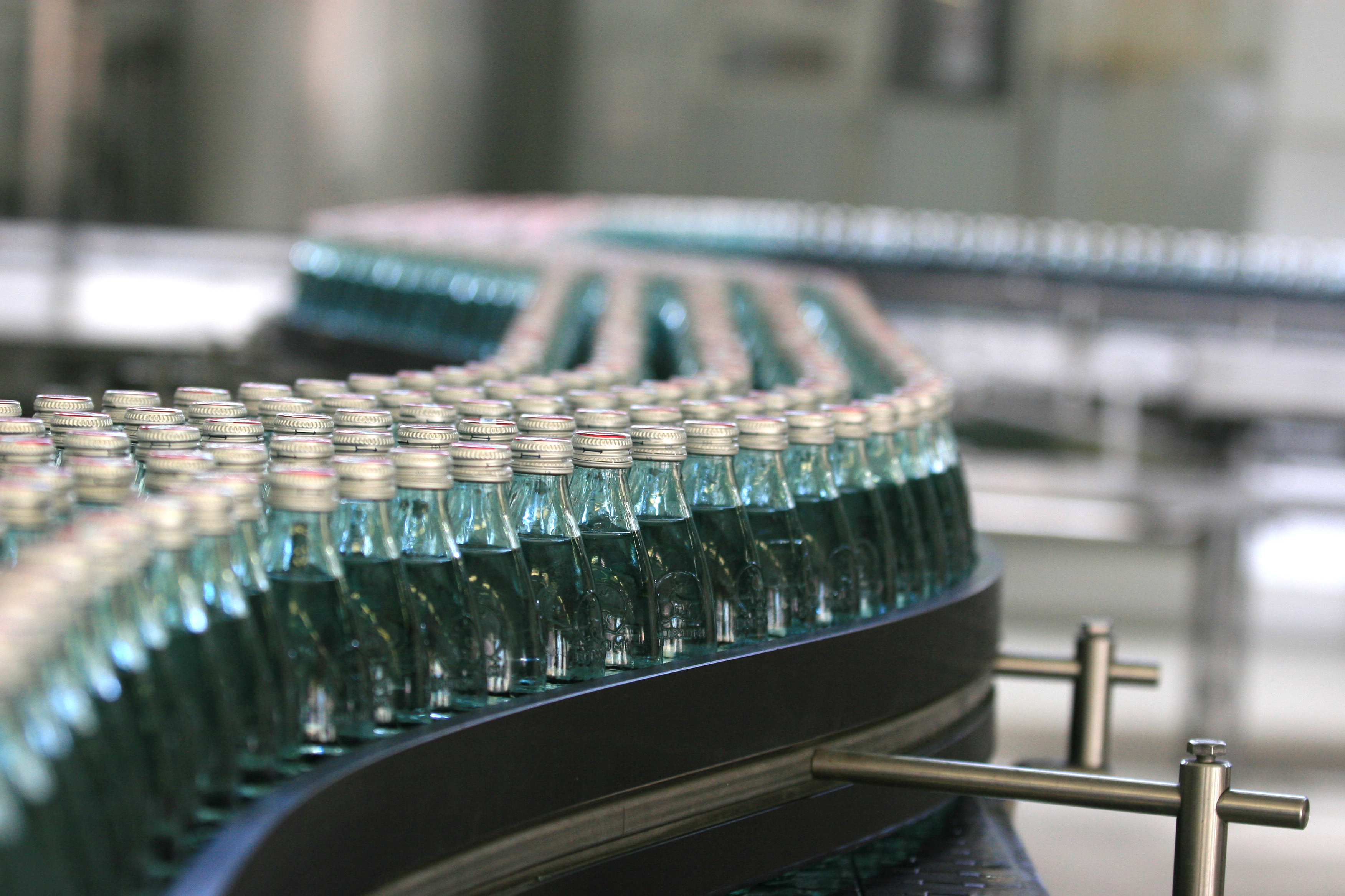 "ბორჯომის" წარმოება